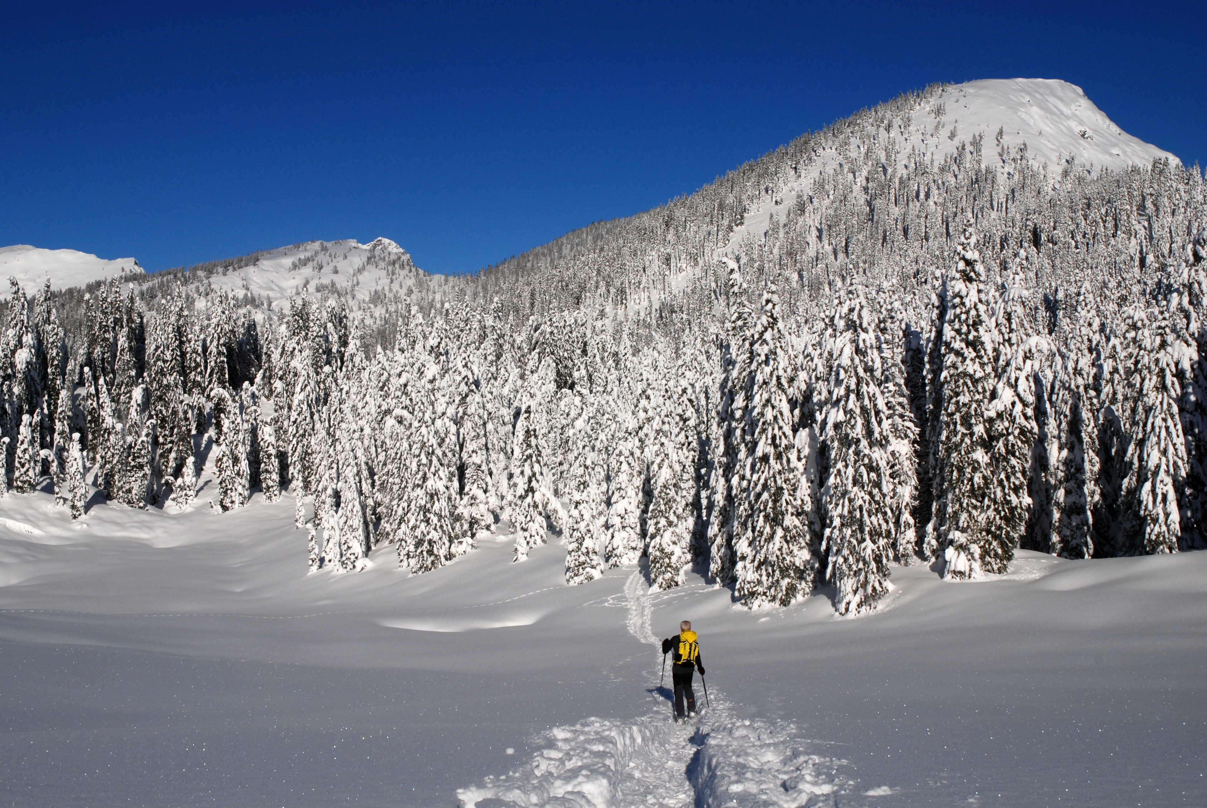 Schneeschuhwanderung zum Mayrwipfl, Sengsengebirge, Österreich